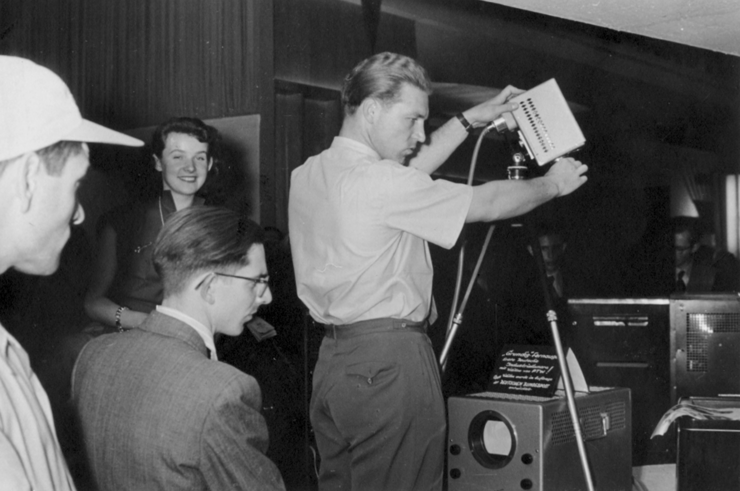 Präsenstation des Grundig Fernauges (Video Kamera) auf der Düsseldorfer Funkausstellung 1953